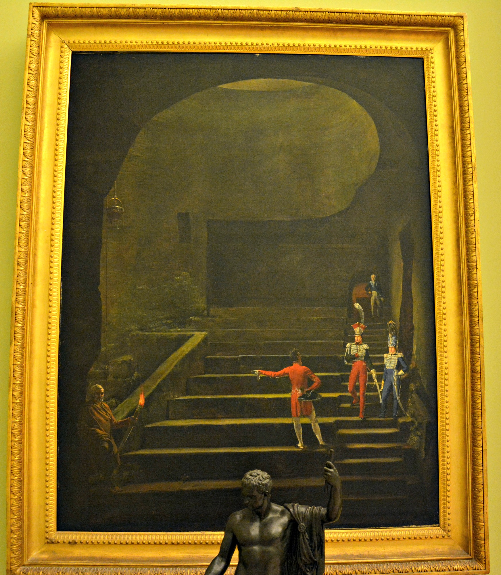 Vedi titolo